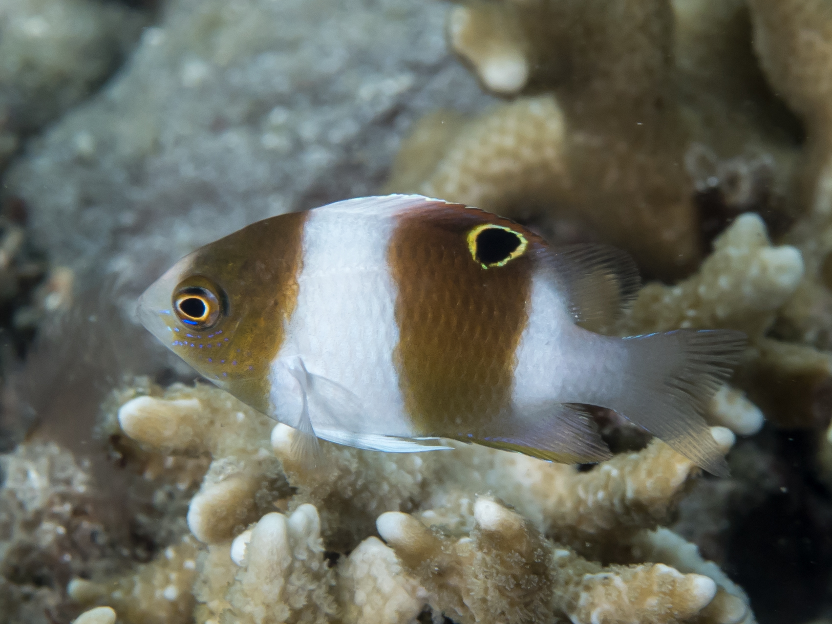 Lembeh, Indonesia - Honeyhead damsel young juvenile (Dischistodus prosopotaenia)